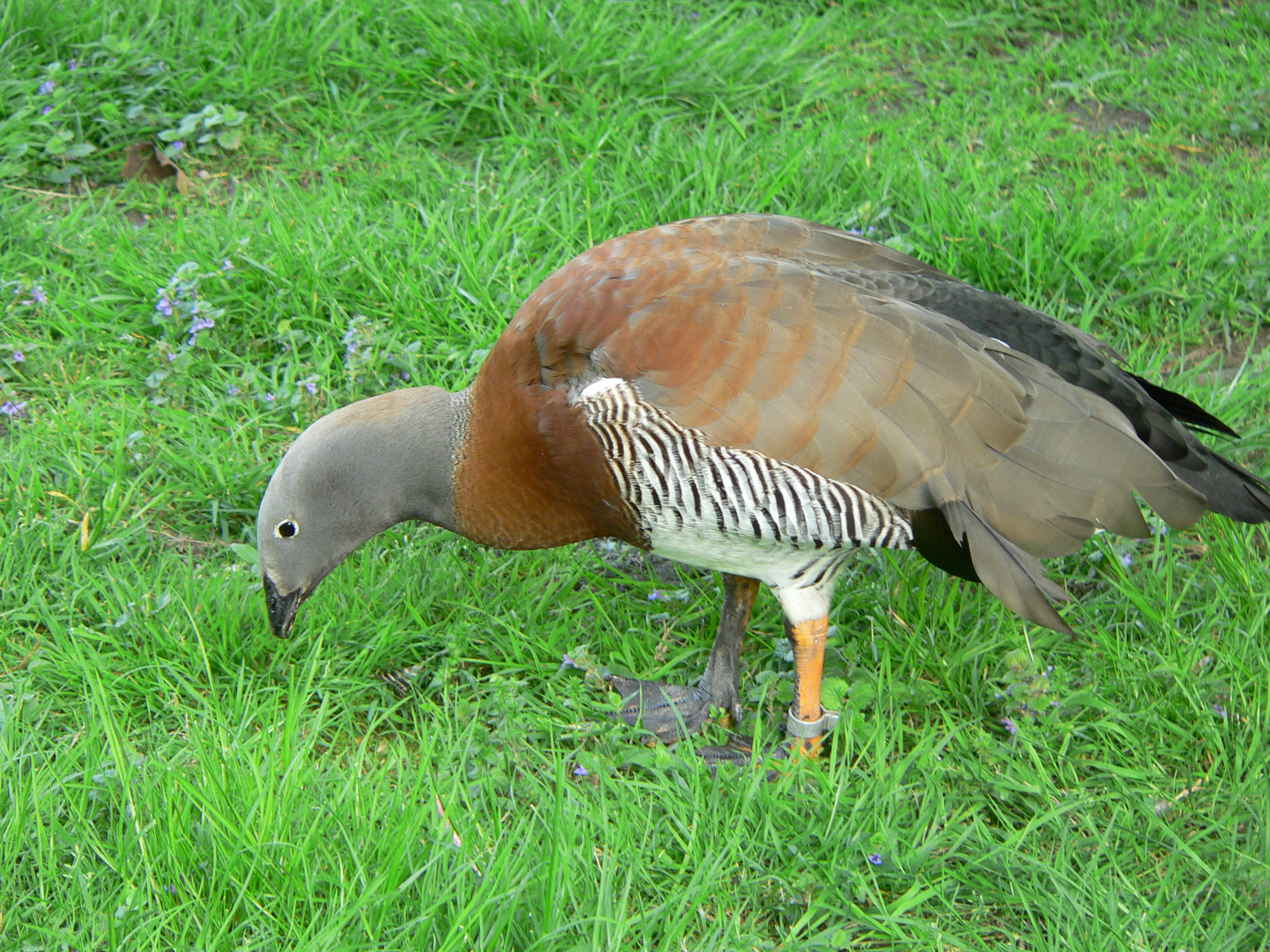 Chloephaga